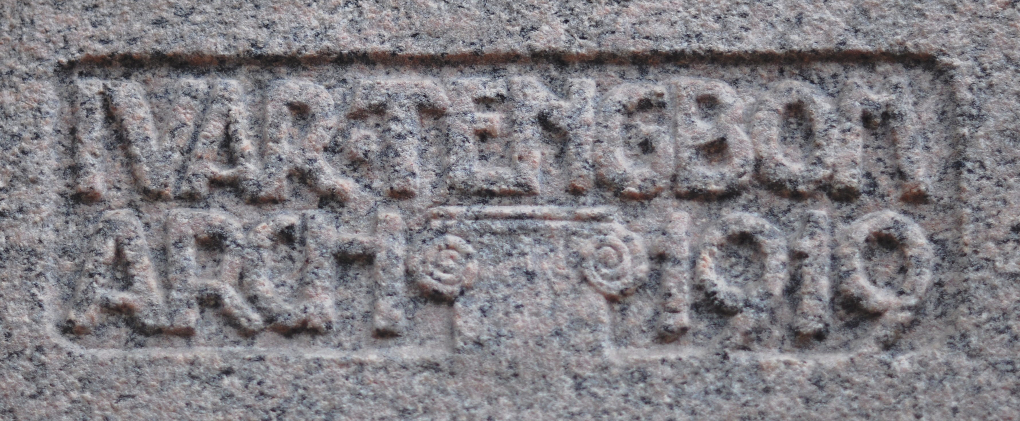 Tengboms namn på Nordstjernans hus